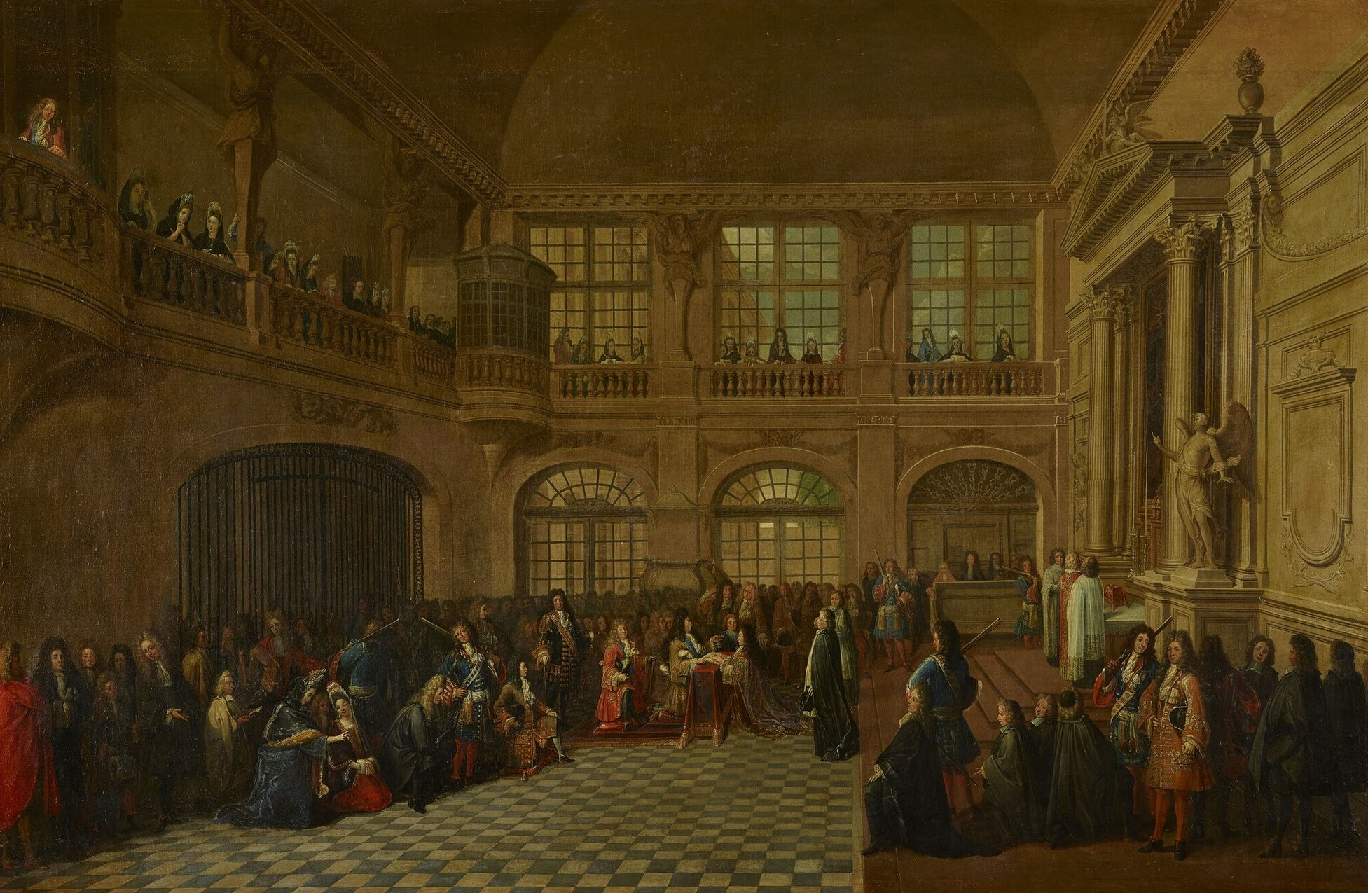 Louis XIV recevant le serment du marquis de Dangeau, grand maître des Ordres réunis de Notre Dame du Mont Carmel et de Saint Lazare, dans la chapelle du château de Versailles, le 18 décembre 1695.